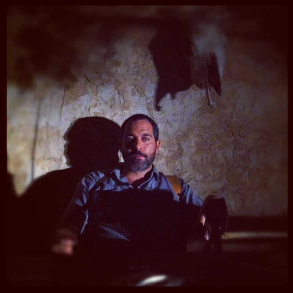 מוריס כהן